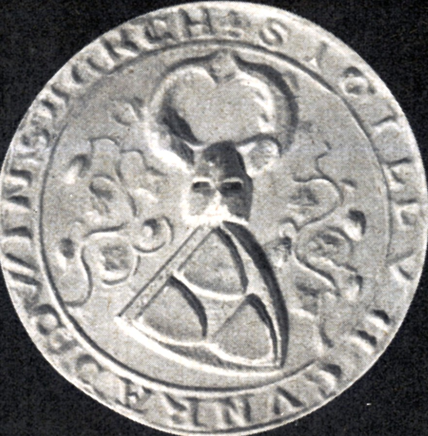 Wappen des Konrad von Weinsberg aus dem 15.Jhdt.